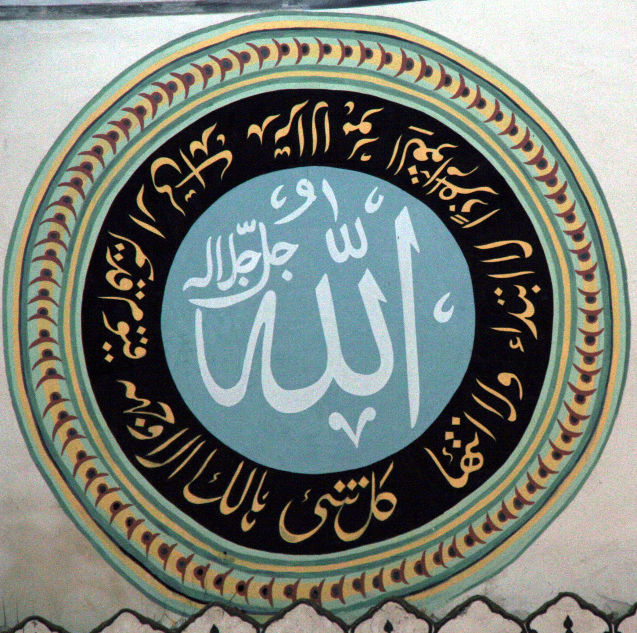 büyük camii çankırı